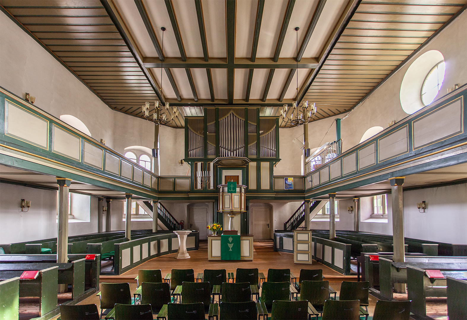 Evangelische Kirche in Wüsten - Innenraum (Bad Salzuflen) This is a photograph of an architectural monument.